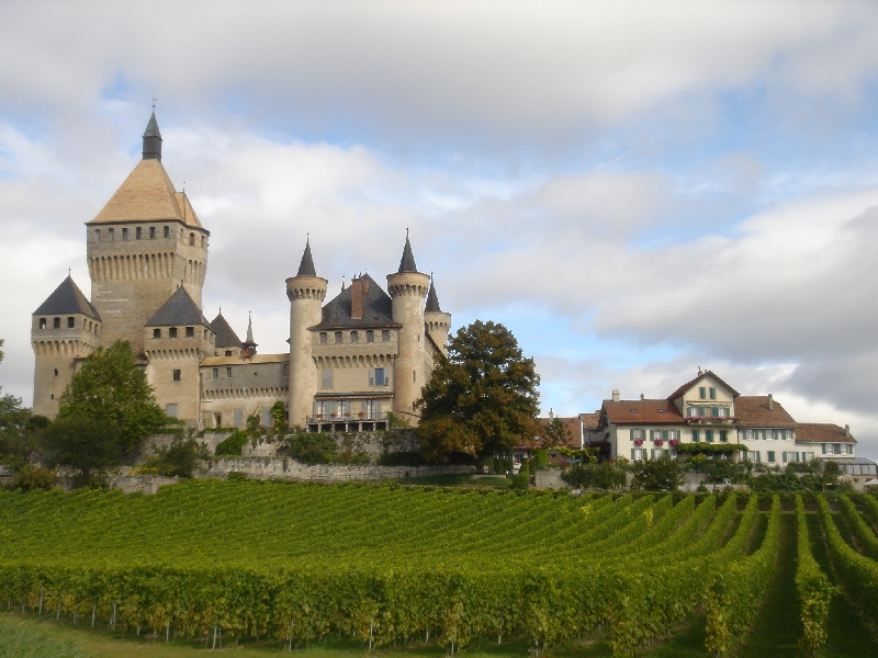 das Schloß von Vufflens-le-Chateau